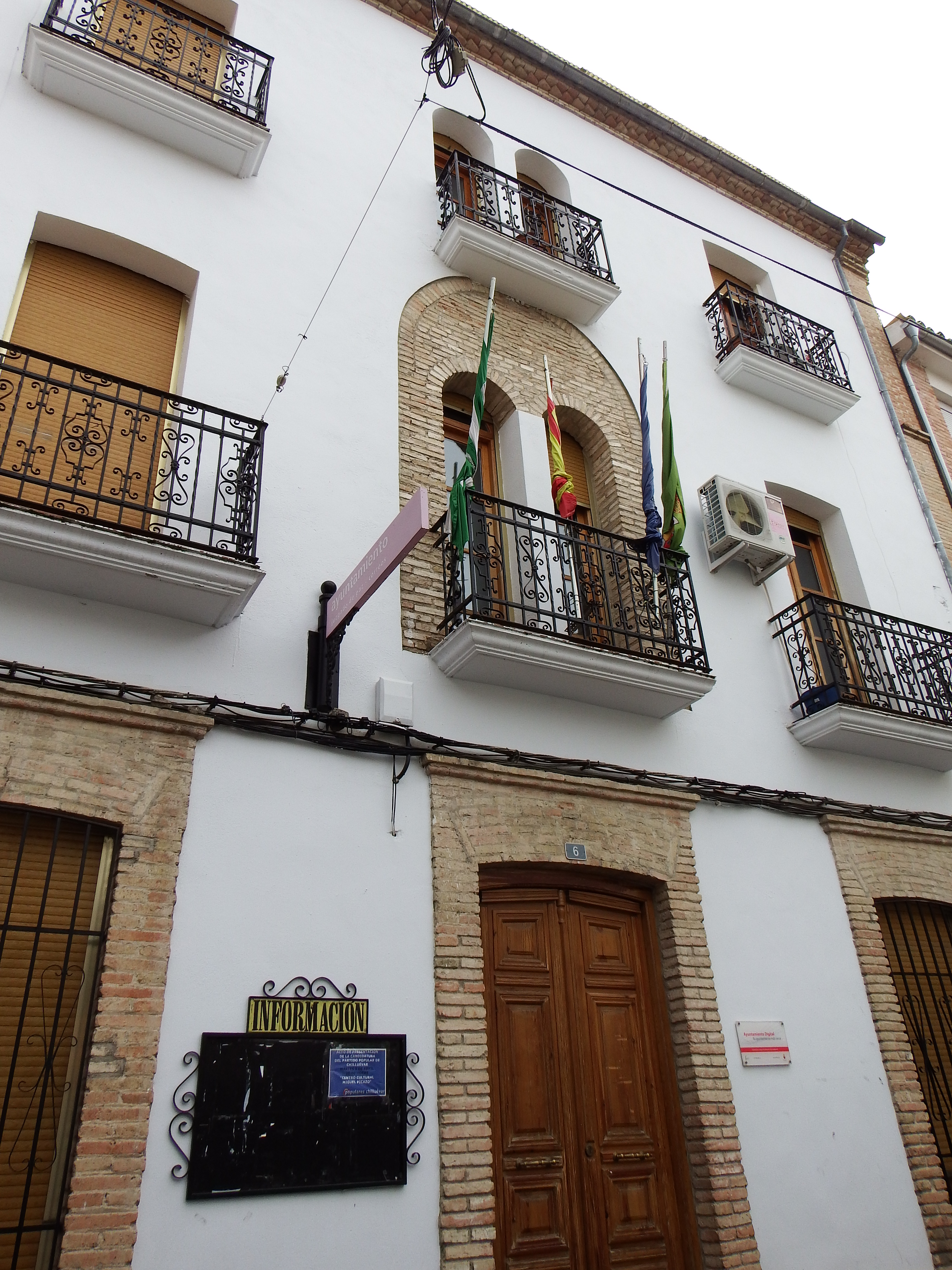 Chilluévar